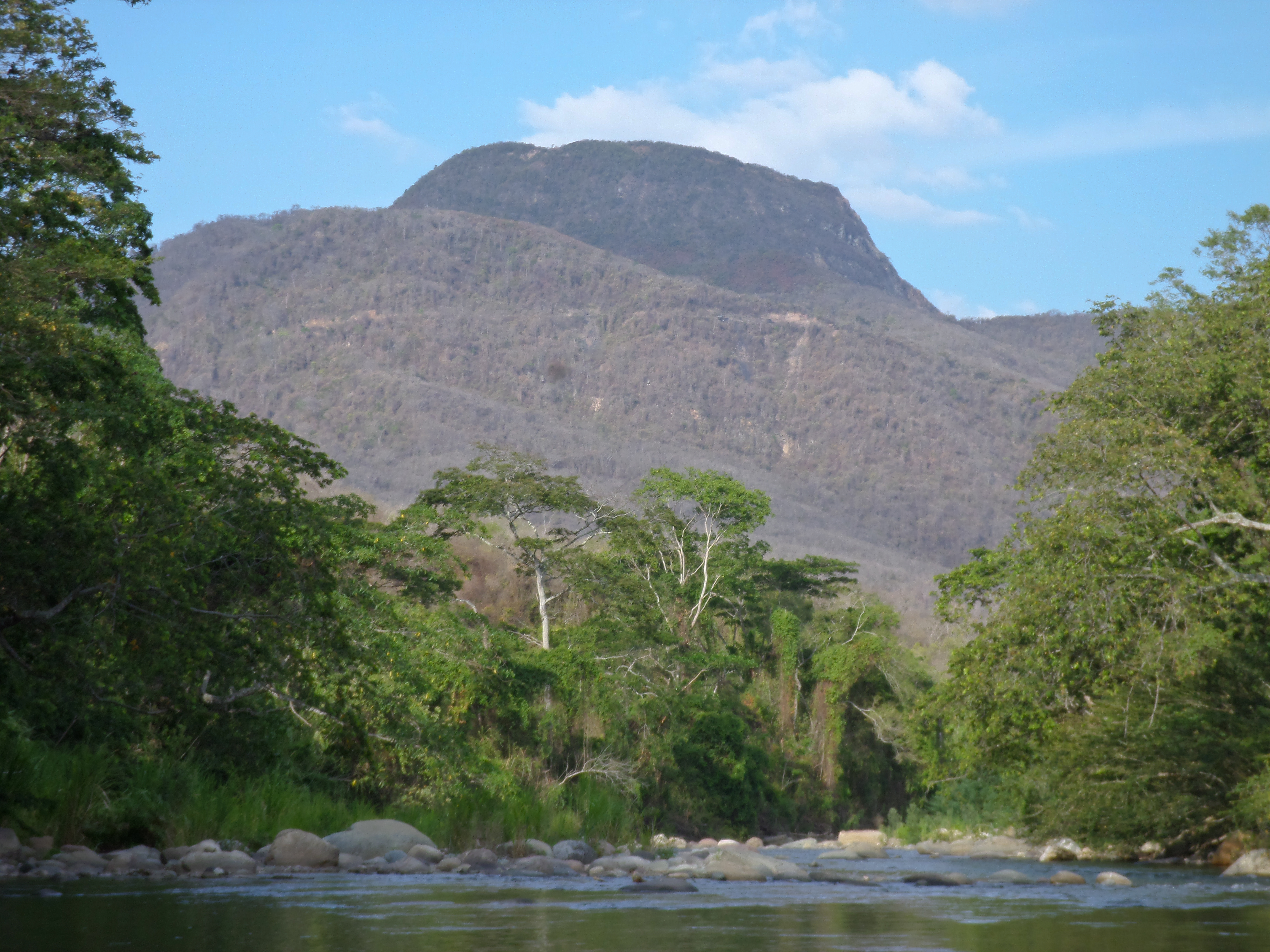 Alto de Los Compadres Santiago Norte de Santander desde el río Peralonso